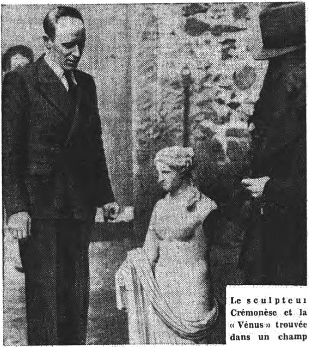 "Le sculpteur Crémonèse et la Vénus trouvée dans un champ" (mi-décembre 1938).